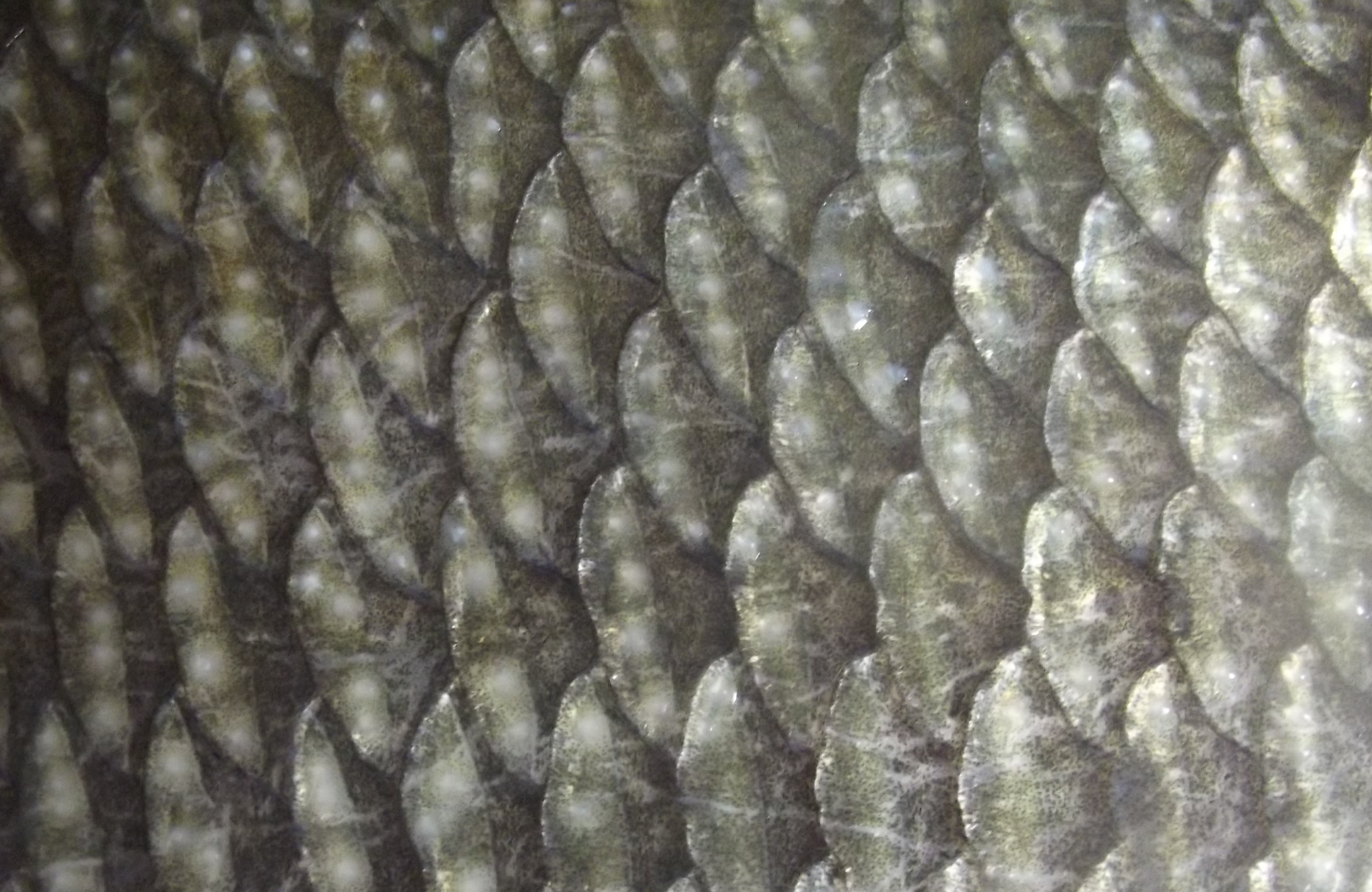 Łuska leszcza (Abramis brama)